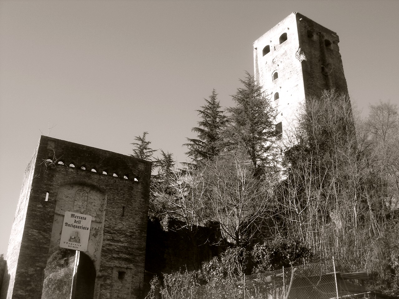 Collalto (Susegana, Treviso, Italia): castello e antica porta.